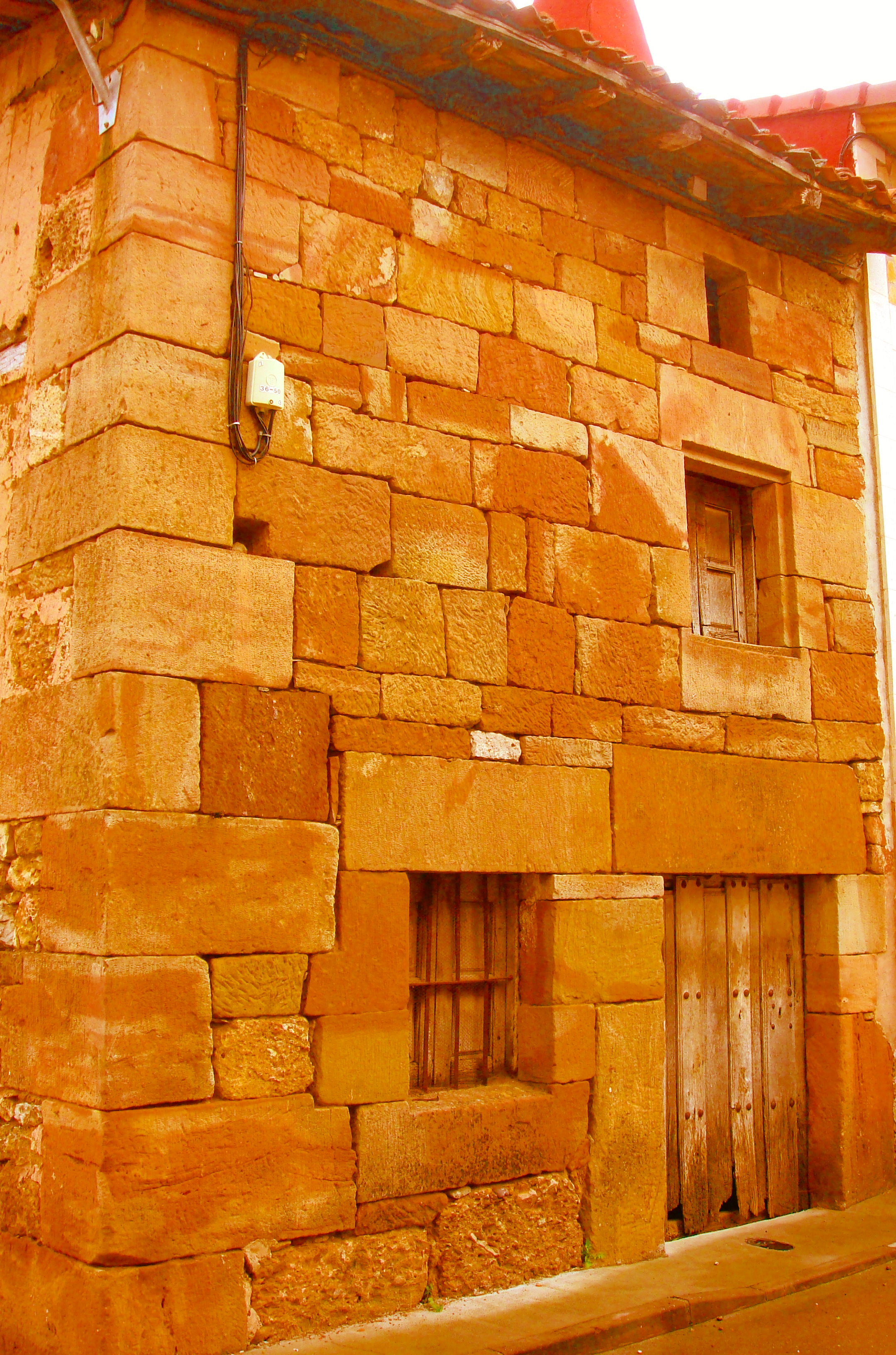 Arquitectura popular, fábrica de sillería, Villasur de Herreros, Burgos (España).